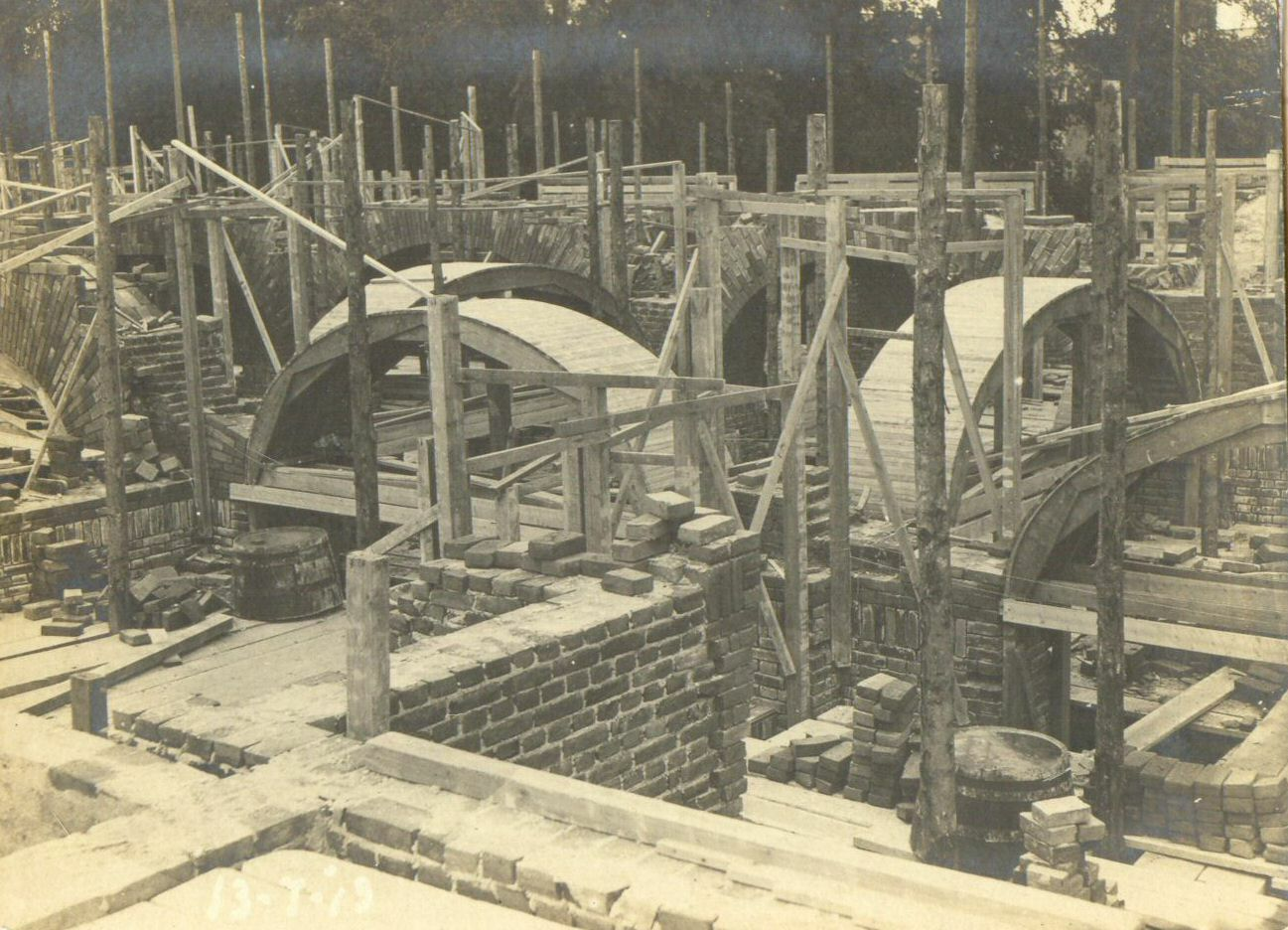 Metselwerkzaamheden voor De Inktpot (3e Administratiegebouw van de Nederlandsche Spoorwegen) te Utrecht. Zichtbaar zijn de reeds deels opgemetselde muren van het souterrain met de formelen (tijdelijke houten ondersteuningsconstructie) voor de bogen.